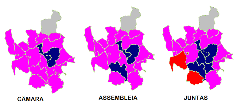 Mapa ilustrativo do partido mais votado por freguesia em Coimbra (2017)